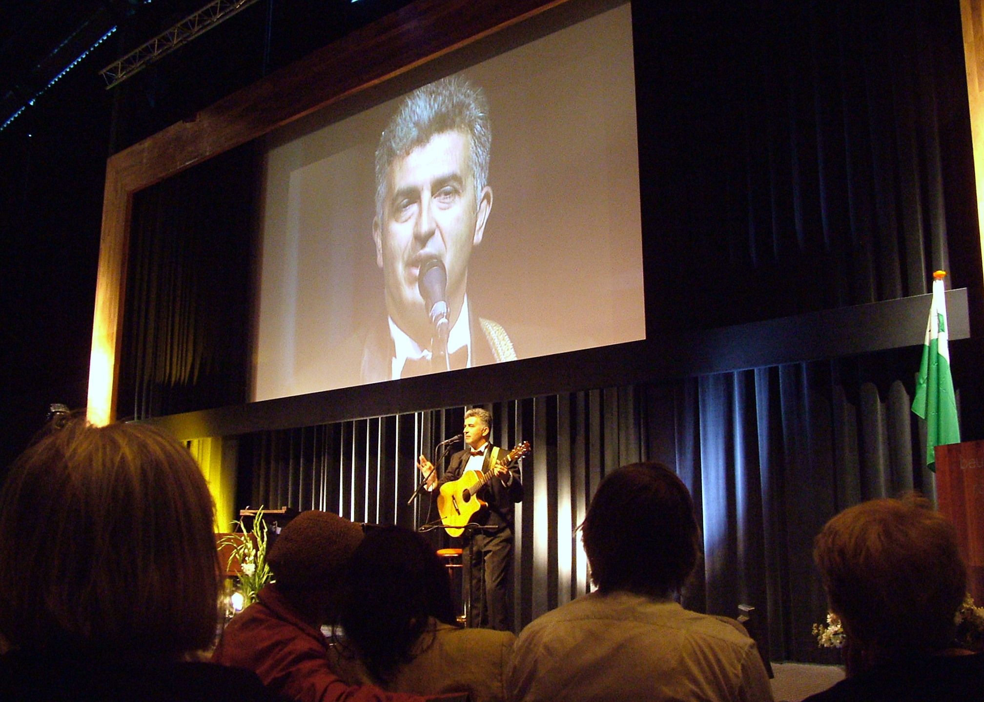 Universala Kongreso de Esperanto, Roterdamo 2008. Kabaredo kun Sasxa Pilipovicx.